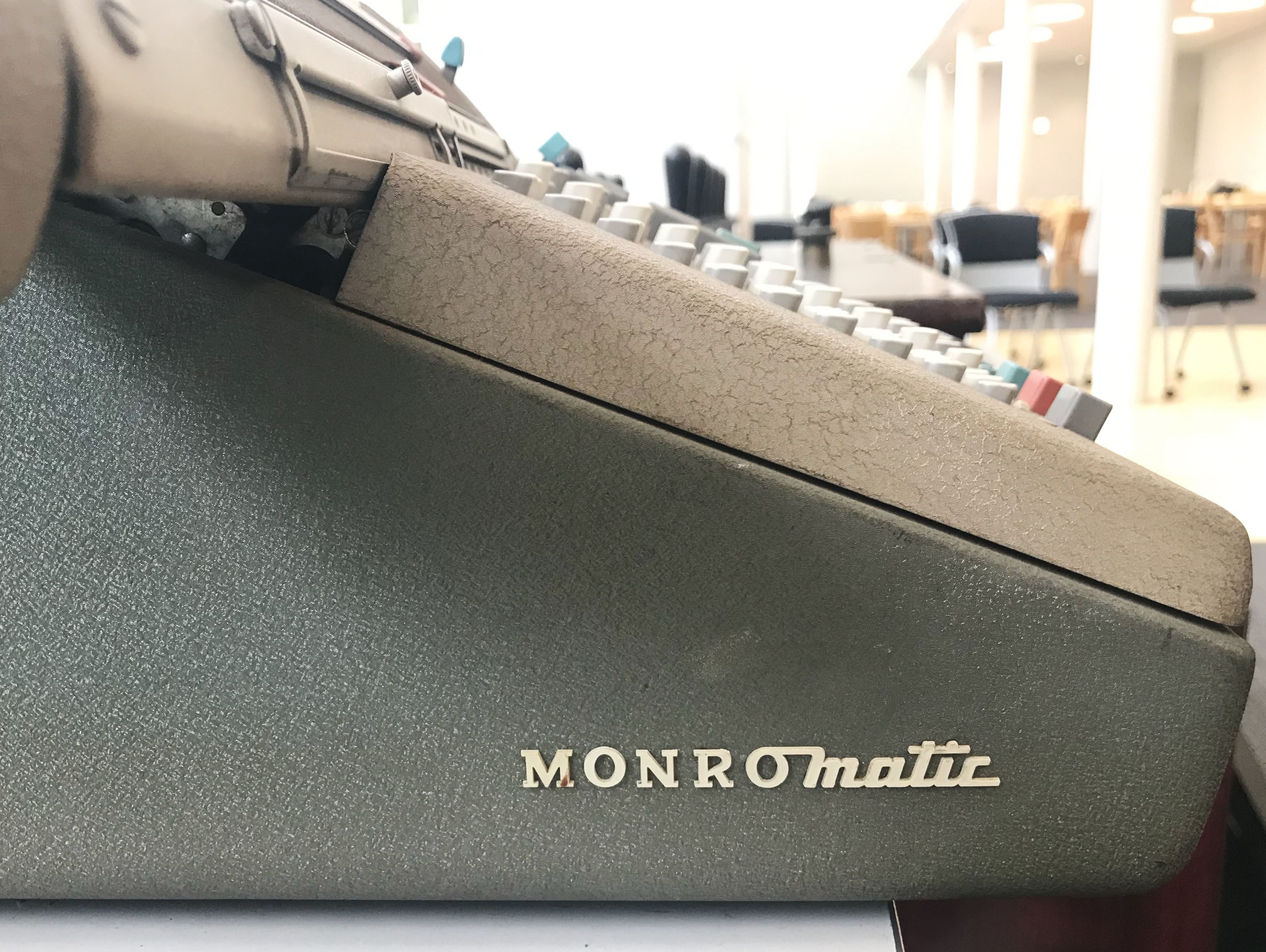 東京電機大学収蔵品